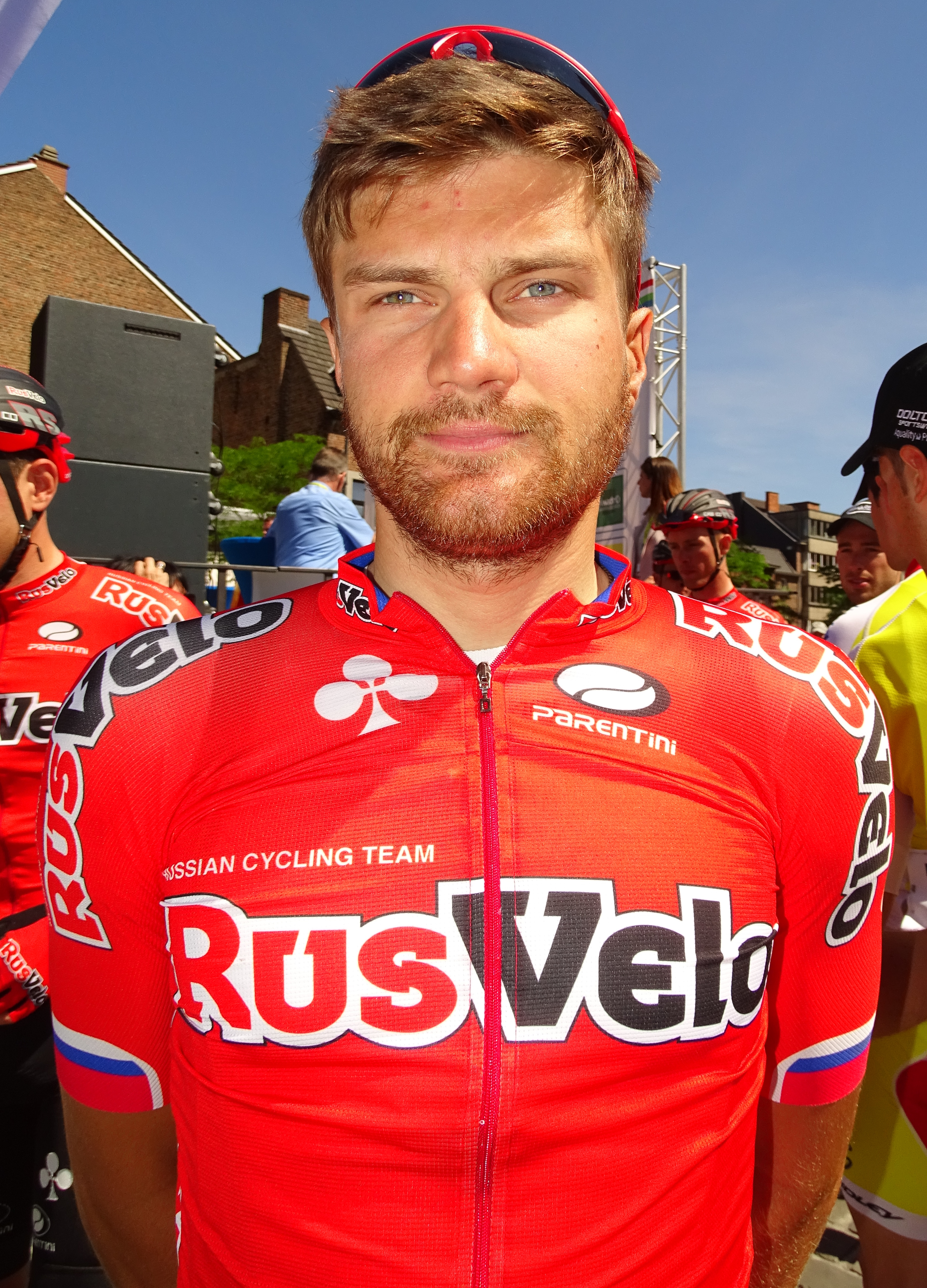 Reportage réalisé le dimanche 14 juin à l'occasion du départ et de l'arrivée du Tour du Limbourg 2015 à Tongres, Belgique.